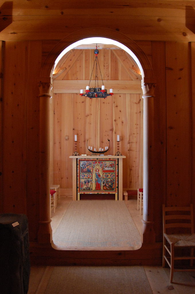 Mot alteret i Heimaey stavkyrkje.